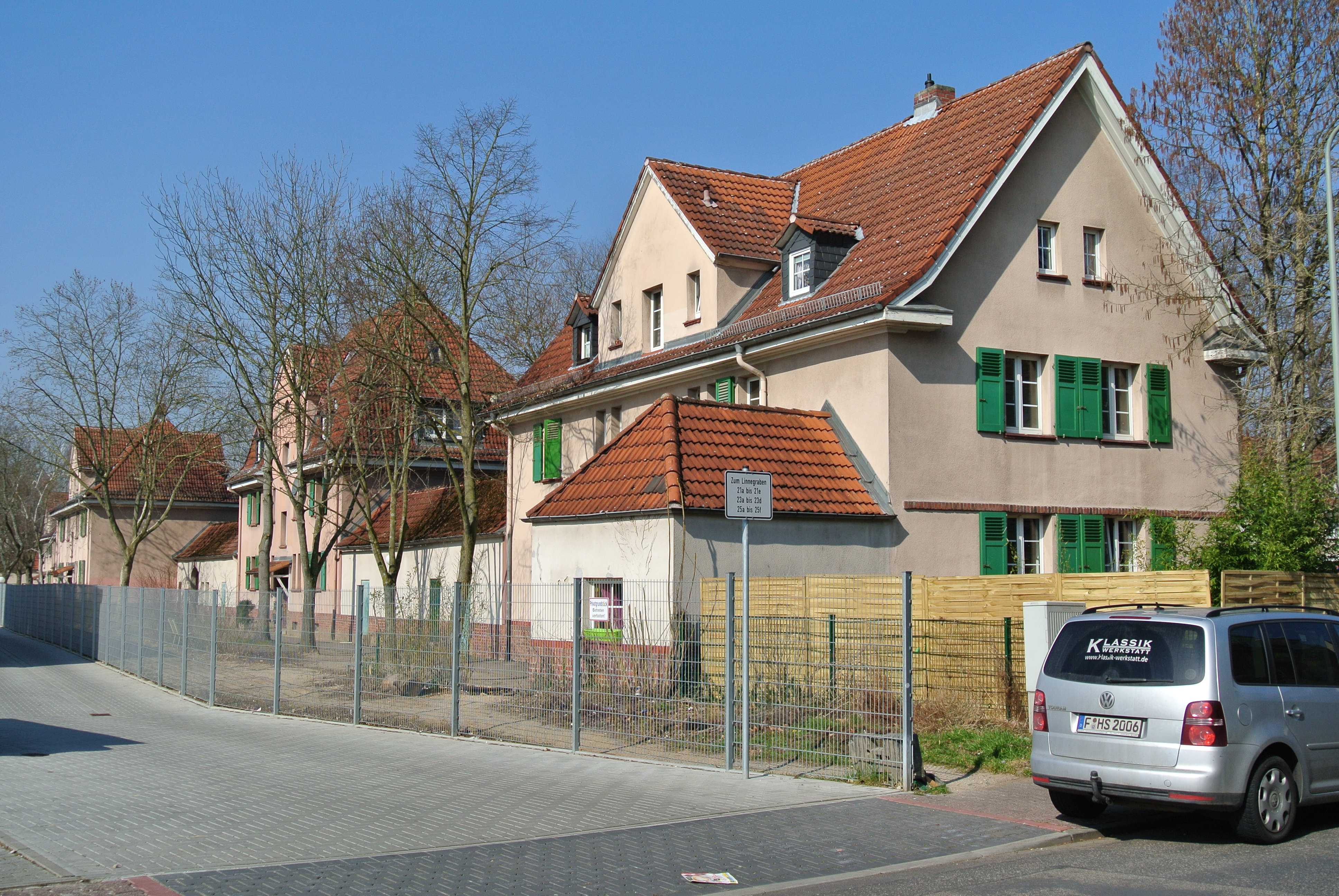 Siedlung Lindenwald (Foockenstraße) in Frankfurt-Griesheim nördlich der Mainzer Landstraße, ab 1921 errichtet, Rehstraße